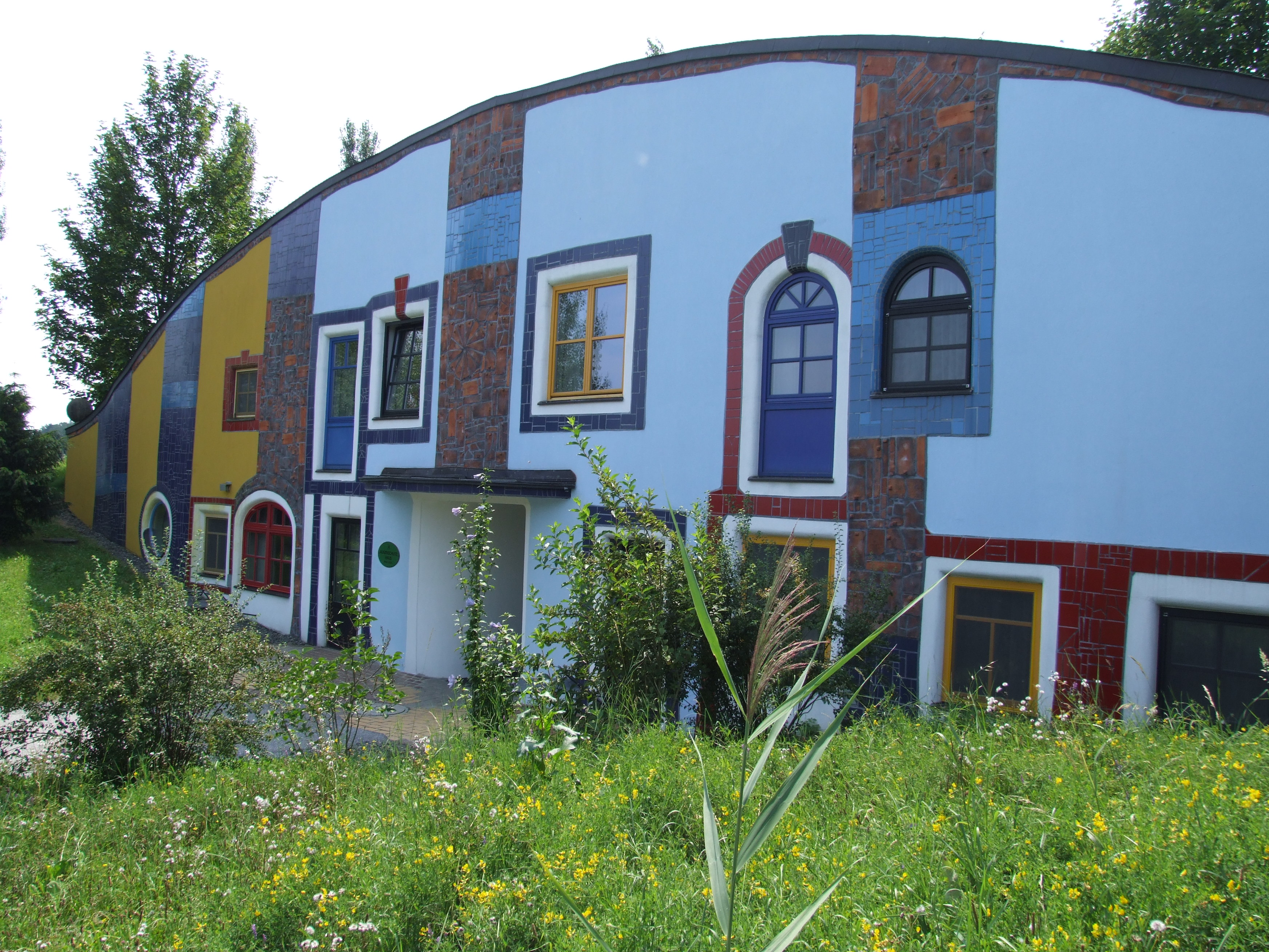 Eines der drei Augenschlitzhäuser, die Friedensreich Hundertwasser im Thermenhotel Rogner Bad Blumau, Bad Blumau, Steiermark, Österreich verwirklichen konnte. Das Haus ist in den Hügel gebaut und bewachsen. Dies entspricht Hundertwassers Forderung: Die Vertikale gehört dem Menschen, die Horizontale gehört der Natur. Die Form der Fassade ähnelt den Augenschlitzen mit denen Friedensreich Hundertwasser seit seiner Zusammenarbeit mit seinem lebenslangen Malerfreund Réne Bro seine Menschen malte. Diese Form wird in diesem Bild besonders deutlich.